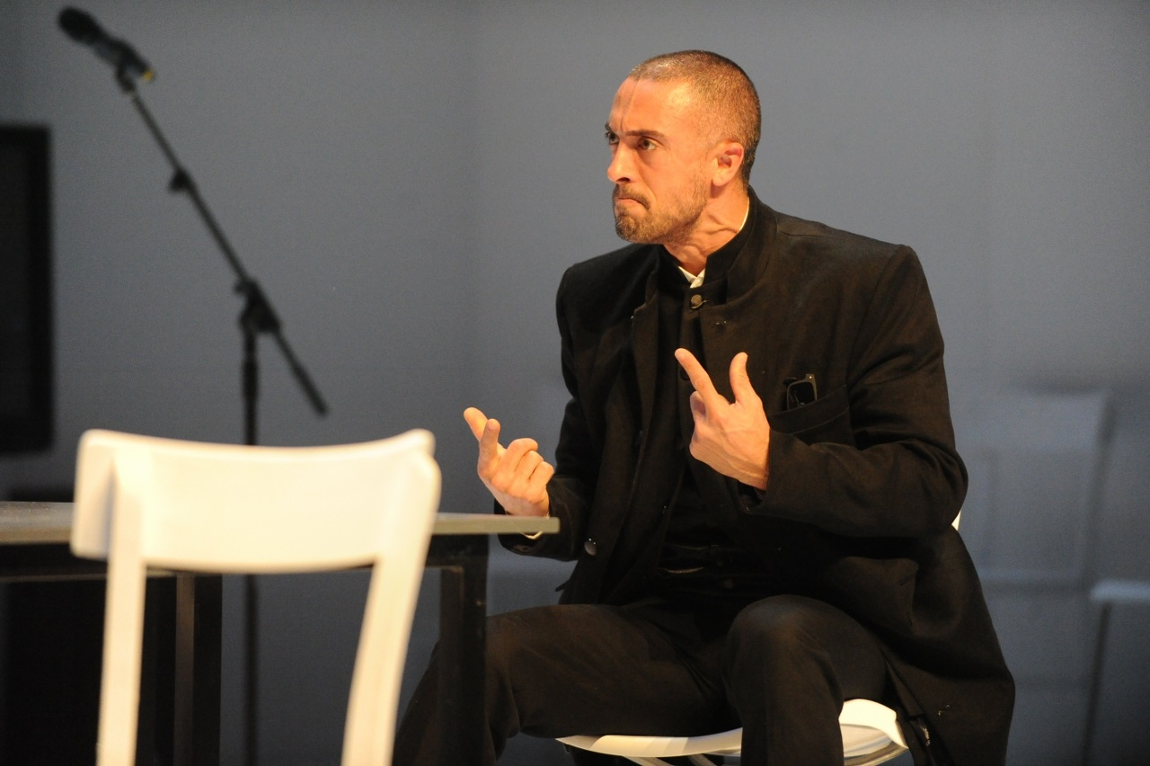 נמרוד ברגמן בהצגה "איפיגניה" מאת אוריפידס, בבימויו של גדי רול, בתיאטרון באר שבע, 2012